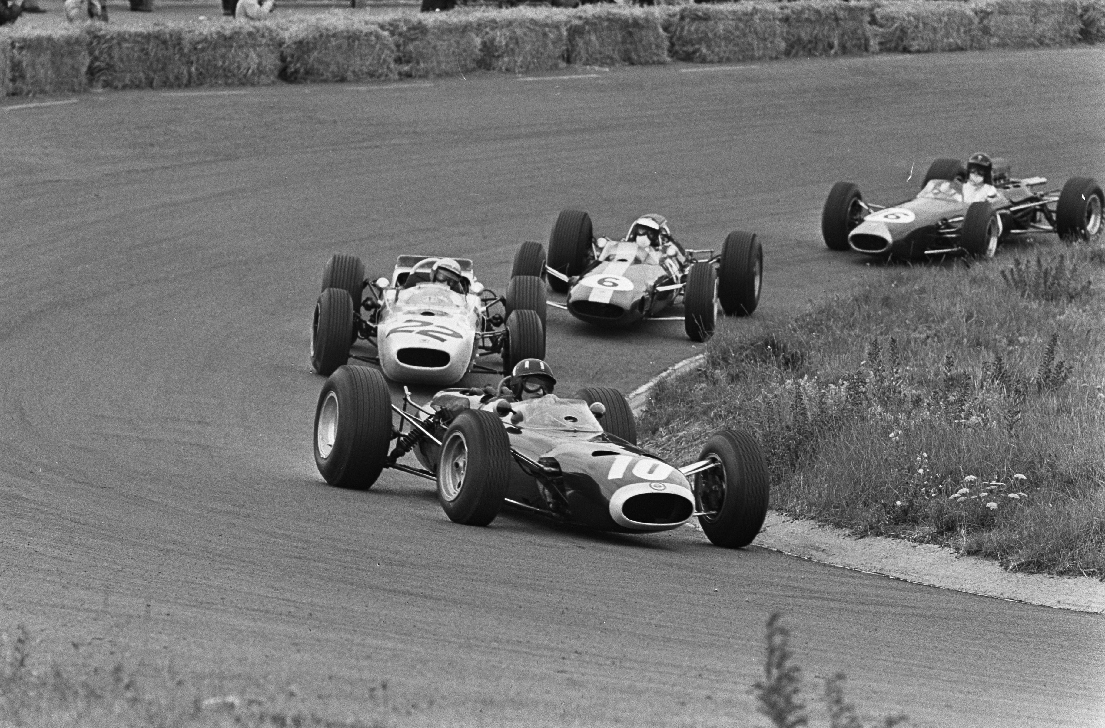 Grote Prijs van Zandvoort, op kop Graham Hill , dan Rickie Ginther en Jim Clark in derde positie.